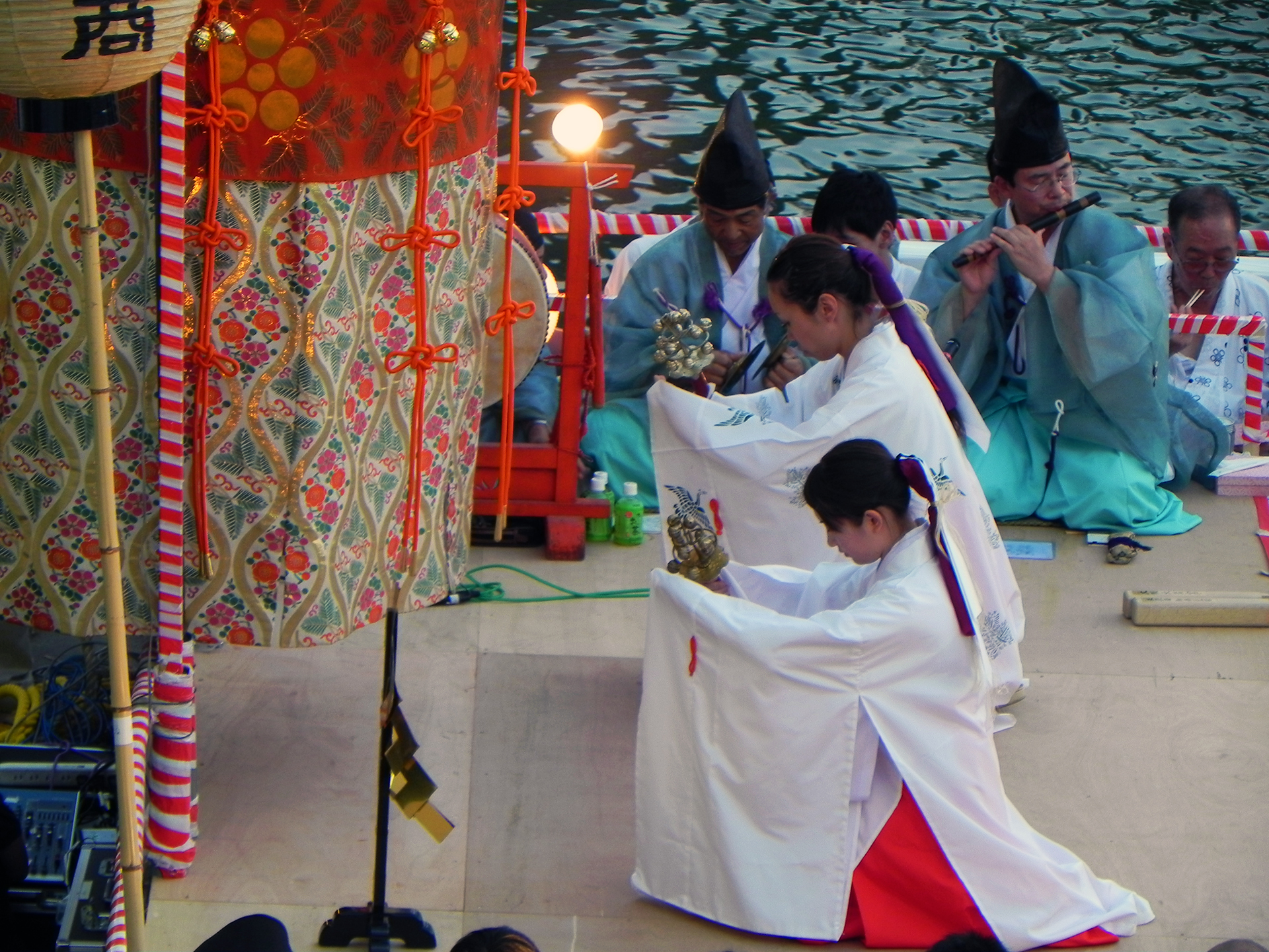 Tenjin Matsuri, Miko performing Kagura on Mikoshi